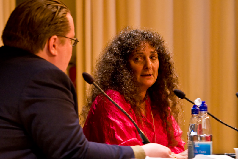 Ellen Datlow at Finncon 2007 in Jyväskylä, Finland - July 2007